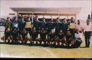 Foto Audace Cerignola